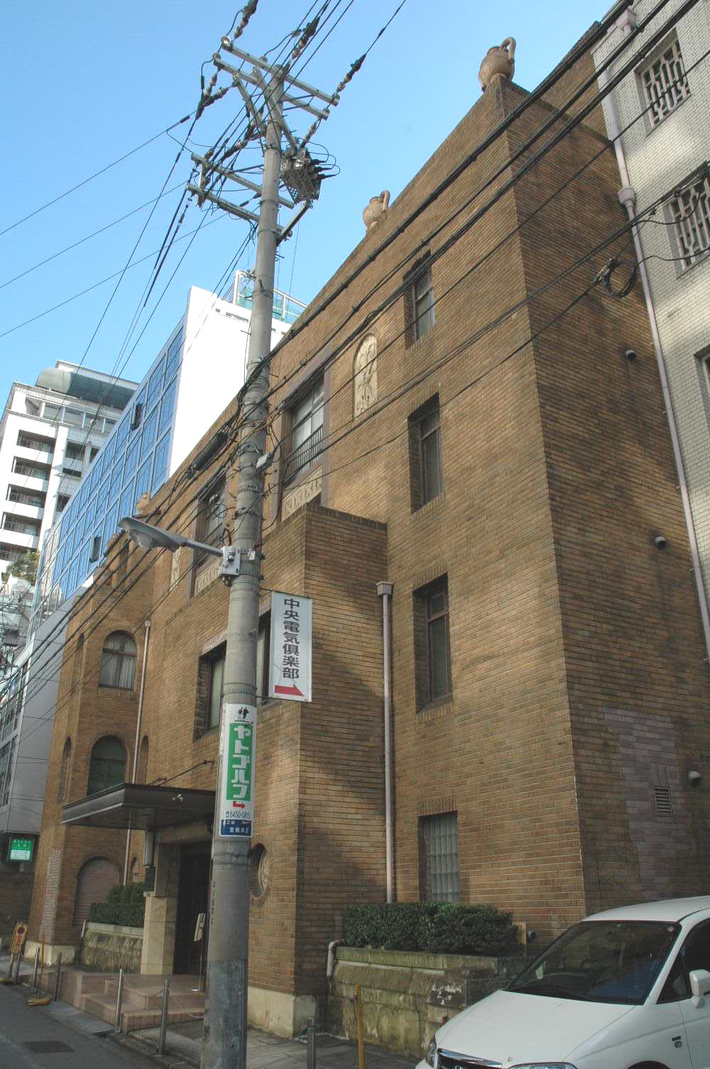 中央電気倶楽部（1930年、大阪市、設計：葛野壮一郎）